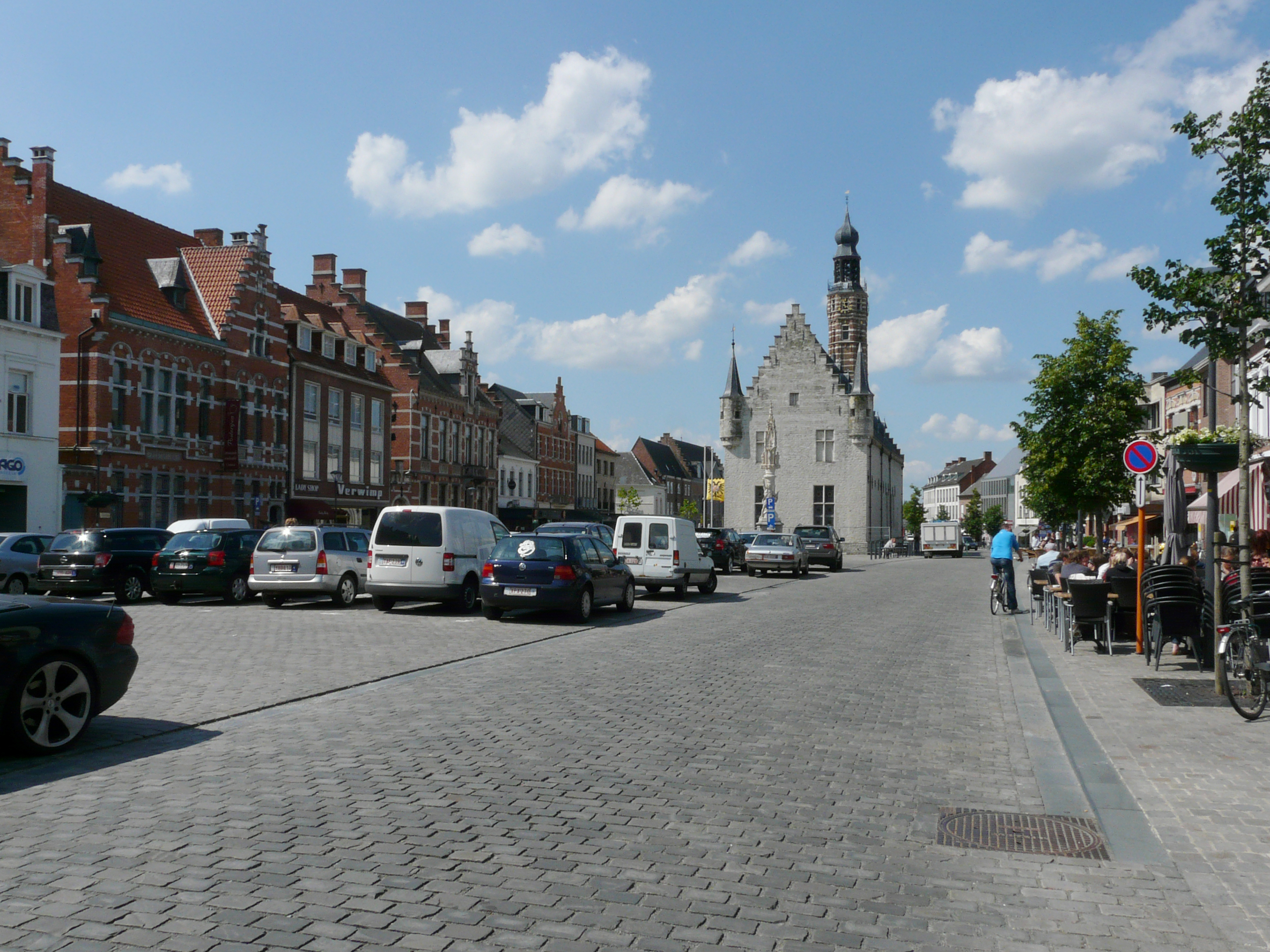 Grote Markt in Herentals